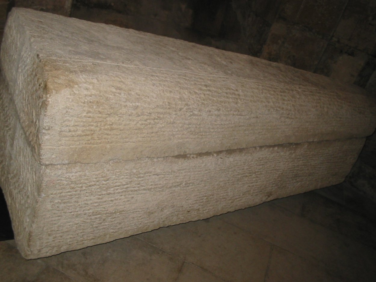 Sarcophagus of Arégonde, Basilique Saint-Denis